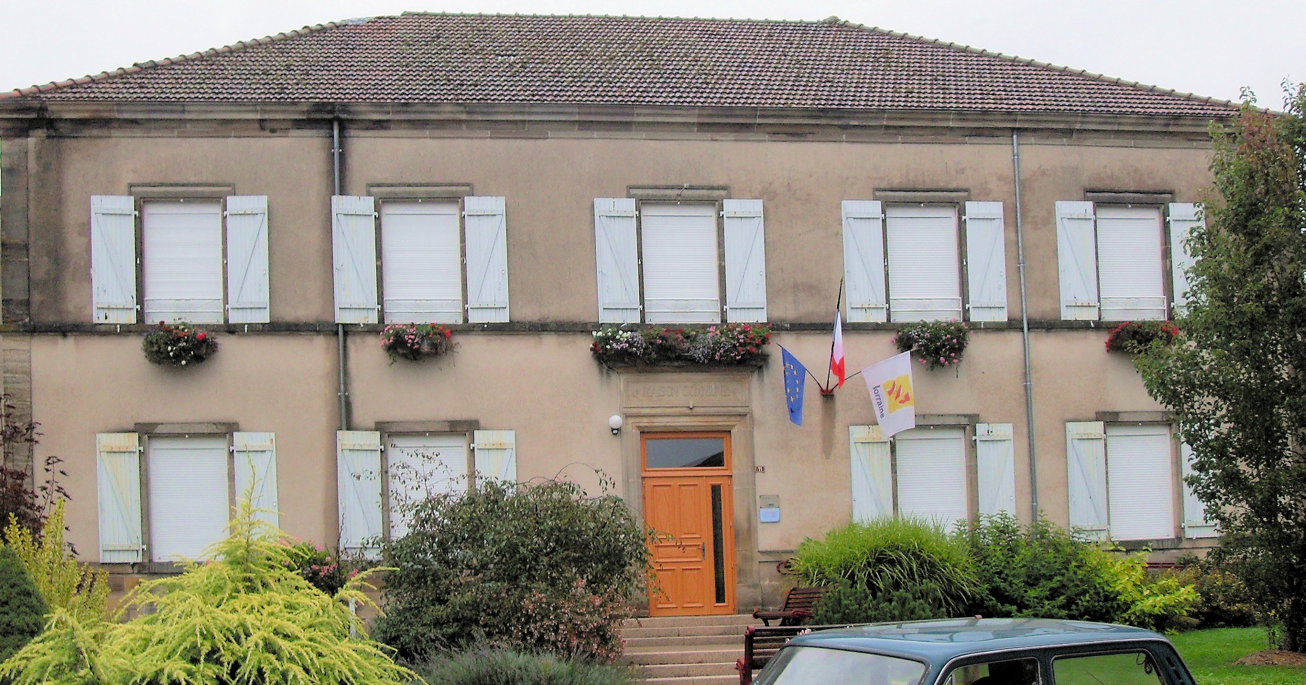 La maison commune de Lerrain